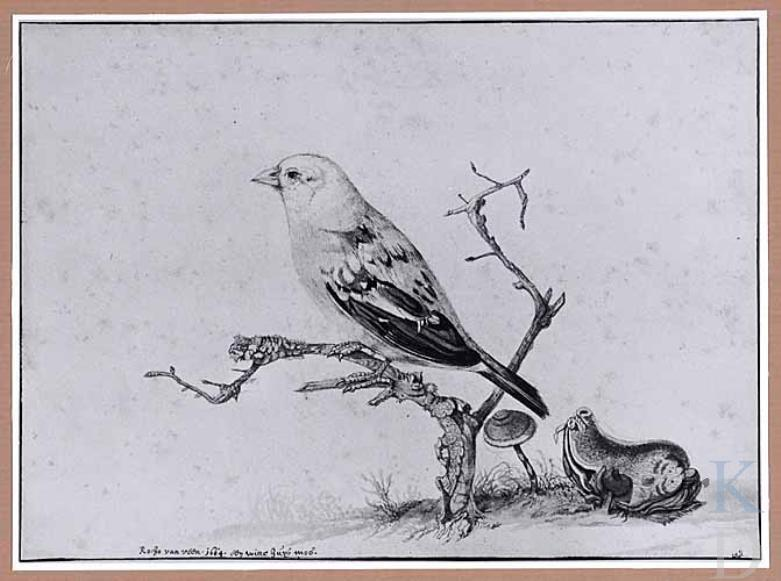 Een witte huys mus, waterverf 200 x 276 mm, gesigneerd en gedateerd onder, links van het midden: Rocho van veen. 1664, Goethe Nationalmuseum, Weimar (Thüringen), inv.nr. 901.